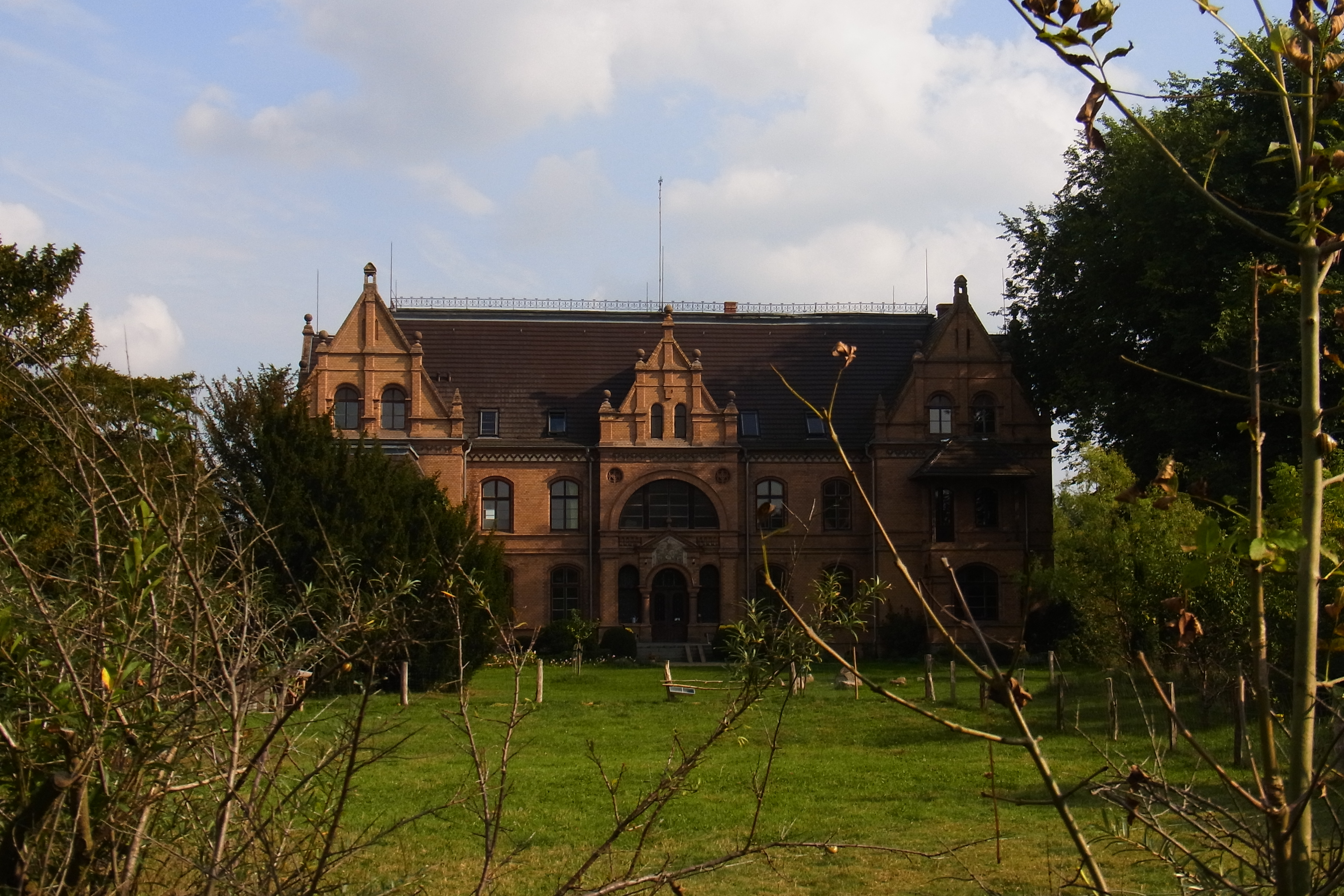 Denkmalgeschütztes Schloss Tornow, erbaut um 1890